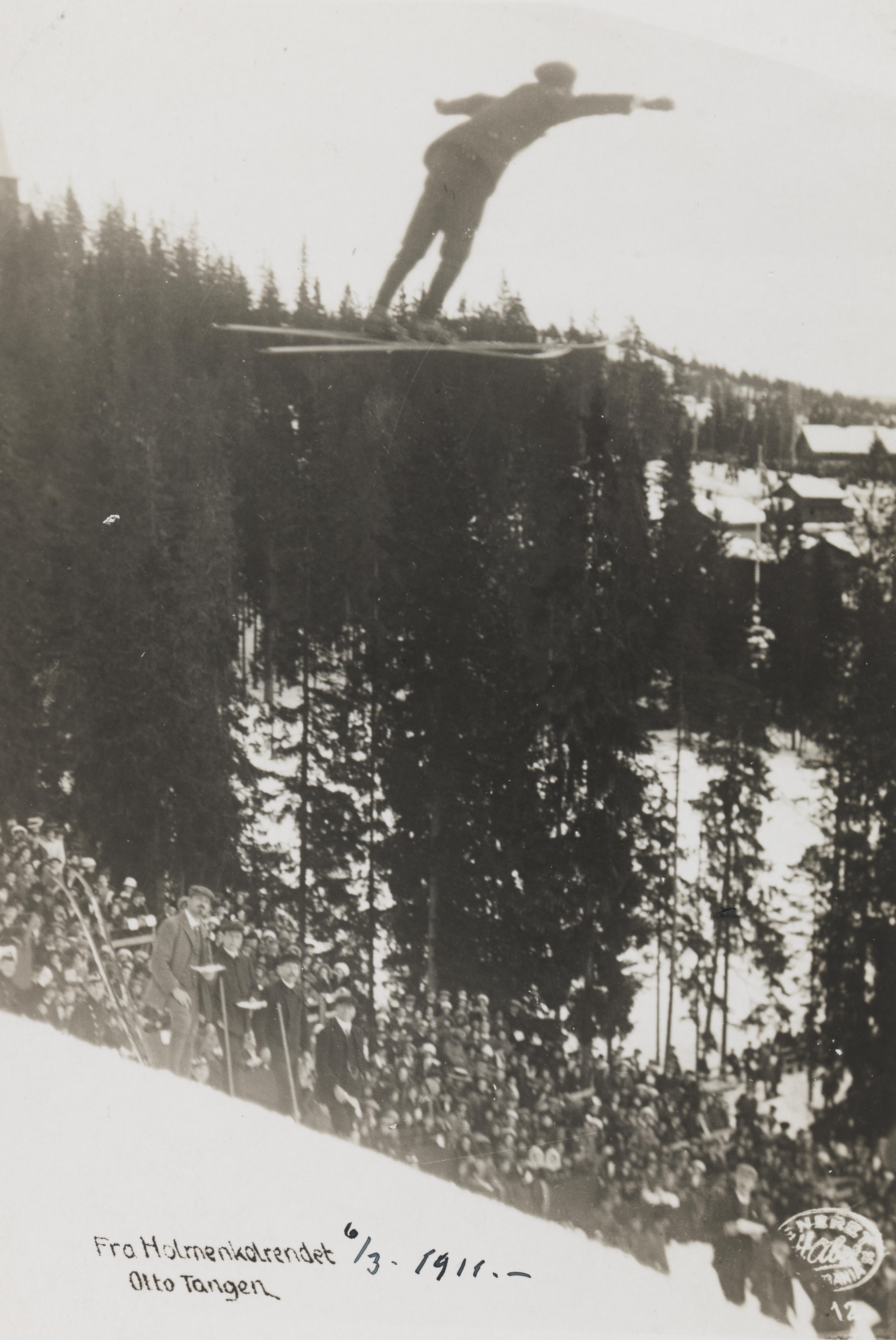 Bildet er hentet fra Nasjonalbibliotekets bildesamling Holmenkollbakken,Holmenkollen, Oslo, Oslo Depicted person: Tangen, Otto